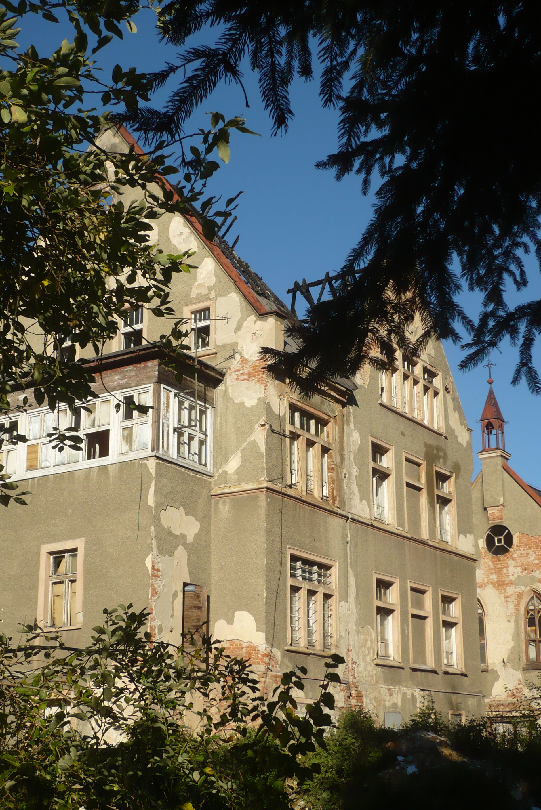 Szpital miejski w Nowej Rudzie